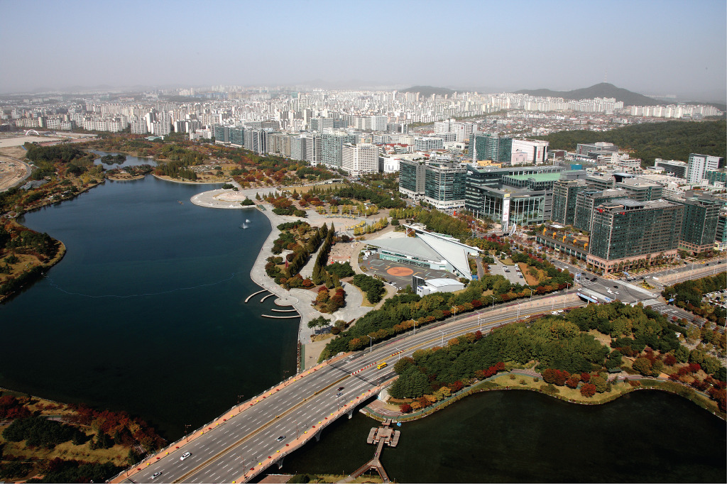 한국어 (조선): 고양시 일산동구에 위치한 호수공원 및 일산 신도시의 전경